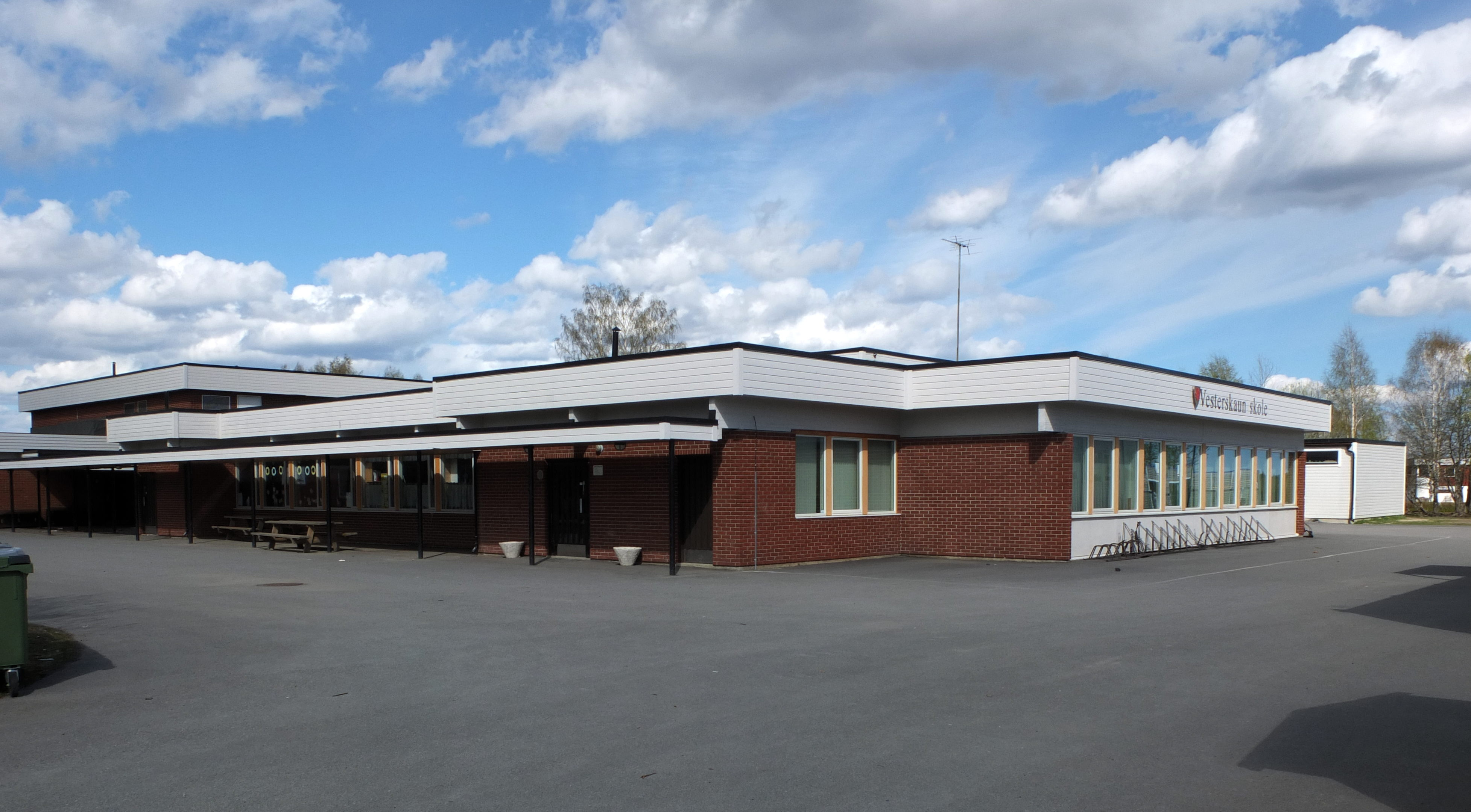 Vesterskaun skole i Sørum